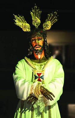 Imagen de Nuestro Padre Jesús Cautivo. Málaga, España.